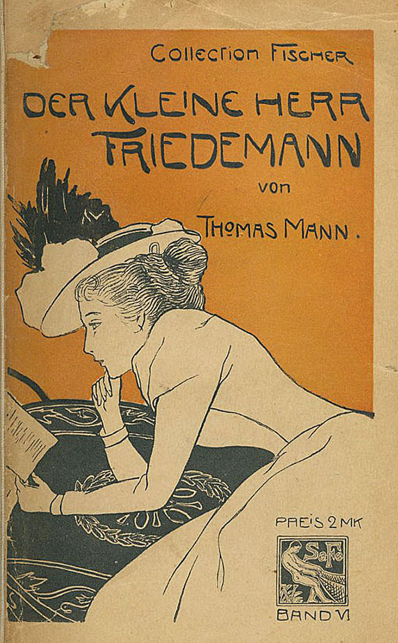 Thomas Mann: Der kleine Herr Friedemann. Novellen. S. Fischer, Berlin 1898. erste Buch-Ausgabe, Illustration von Johann Baptist Scherer († 1910)